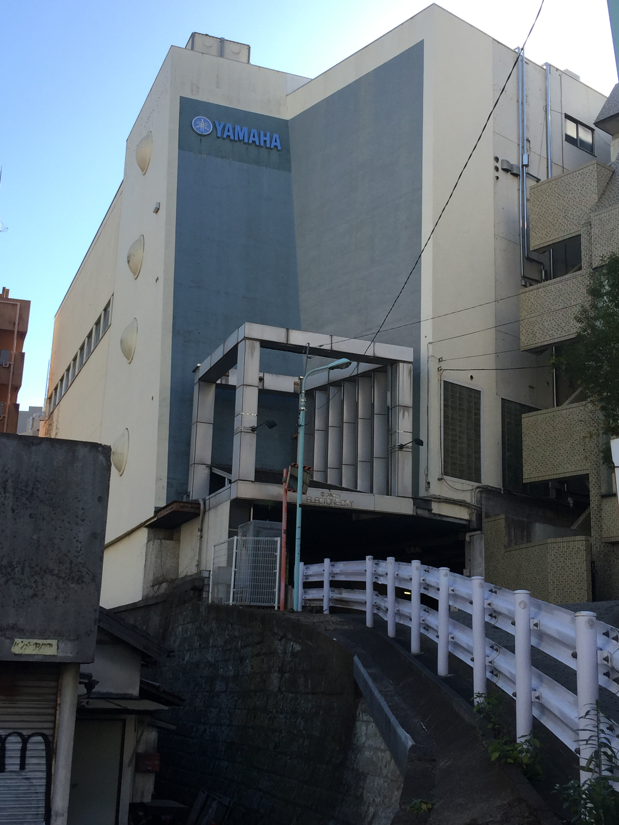 外観の写真